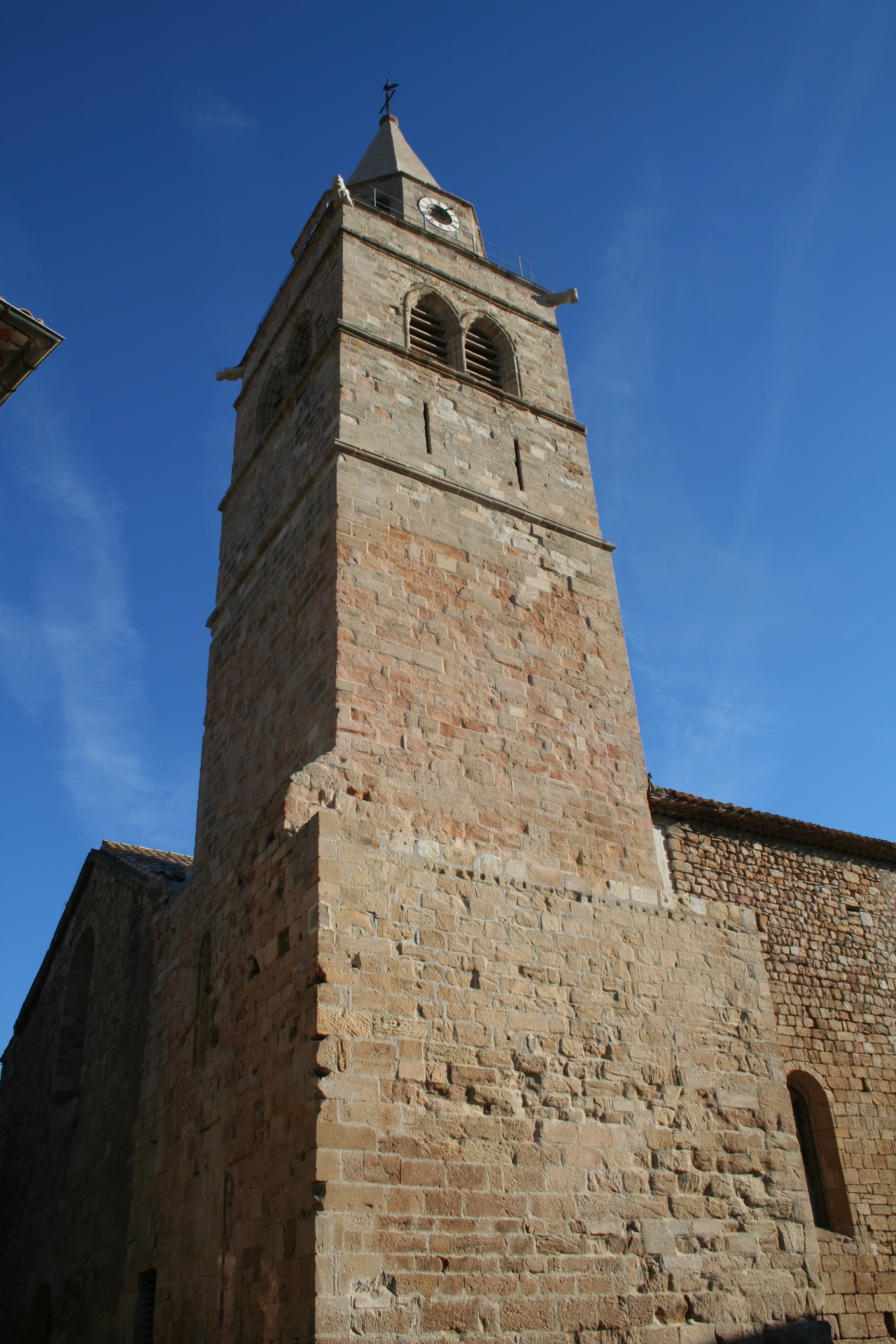 Gabian (Hérault) - Clocher de l'église Saint-Julien-et-Sainte-Balisisse.